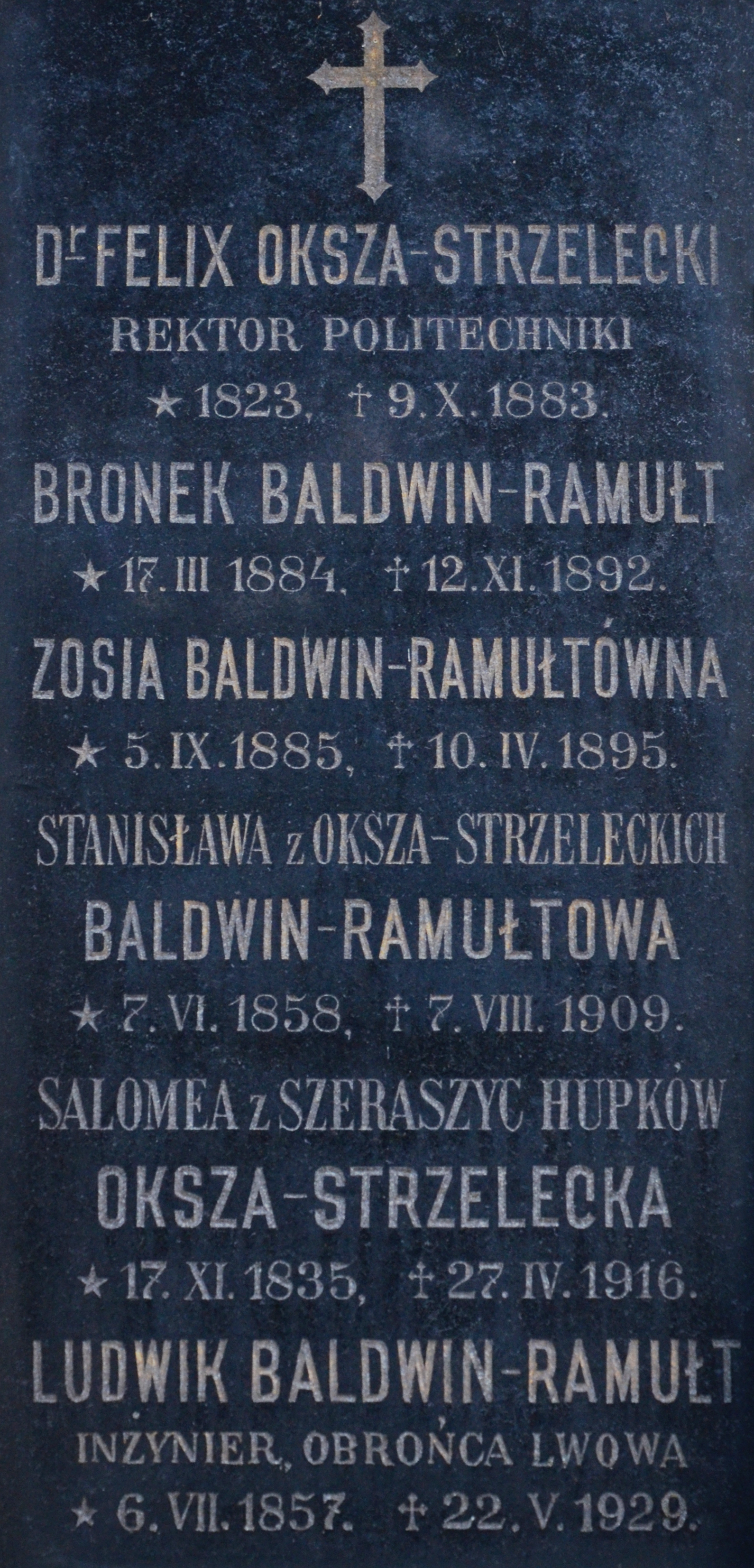 Надгробок родин Балдвін-Рамултів і Стшелецьких на Личаківському цвинтарі у Львові. Серед похованих, зокрема, архітектор Людвік Балдвін-Рамулт і ректор політехніки Фелікс Стшелецький.